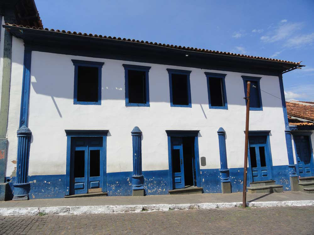 Teatro Municipal de Sabará